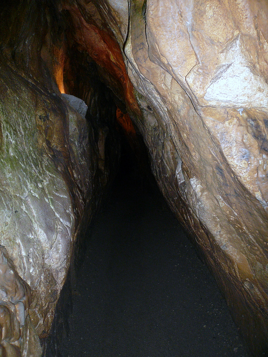 Charlottenhöhle